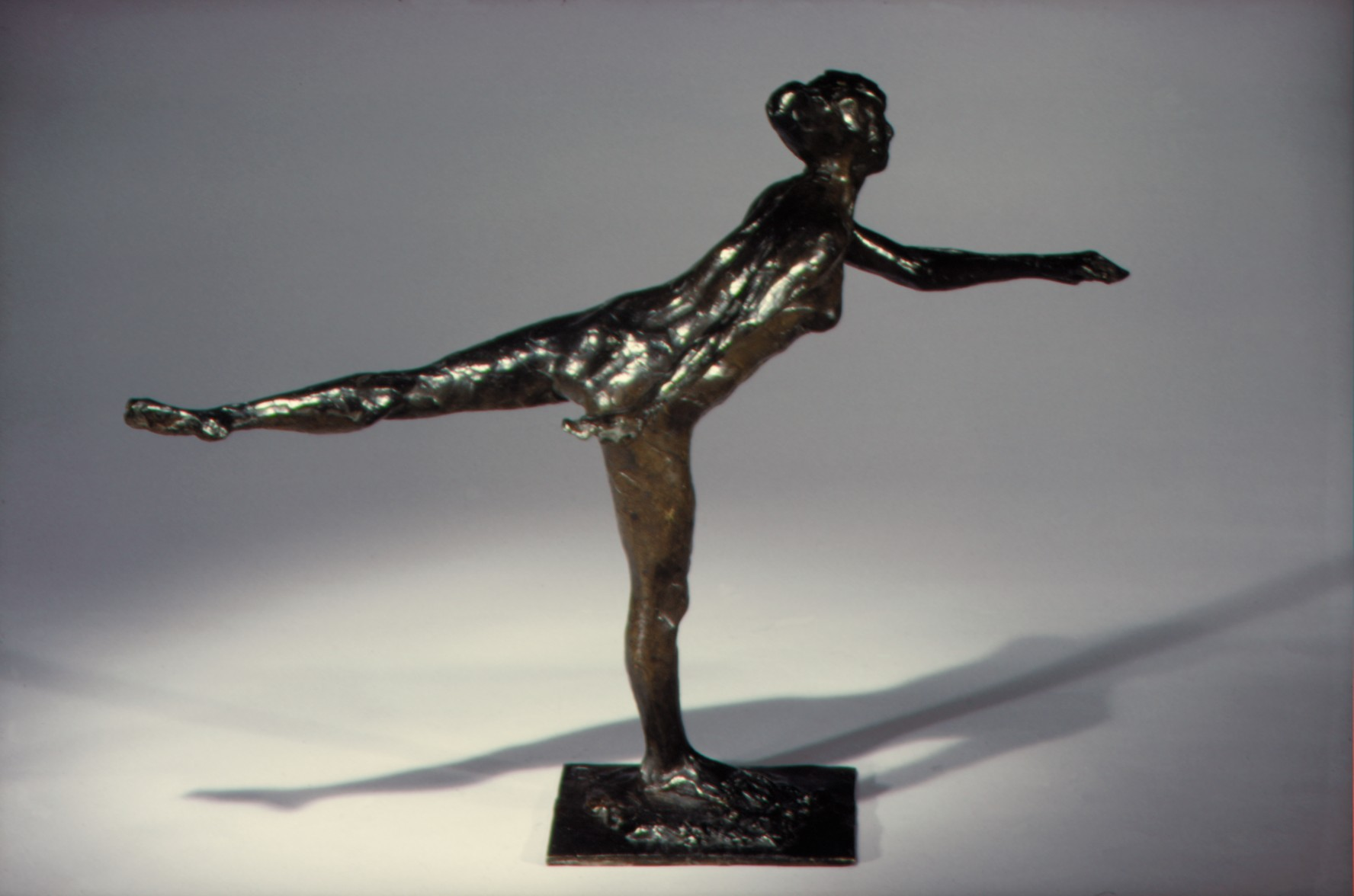 French; Statuette; Sculpture-Bronze